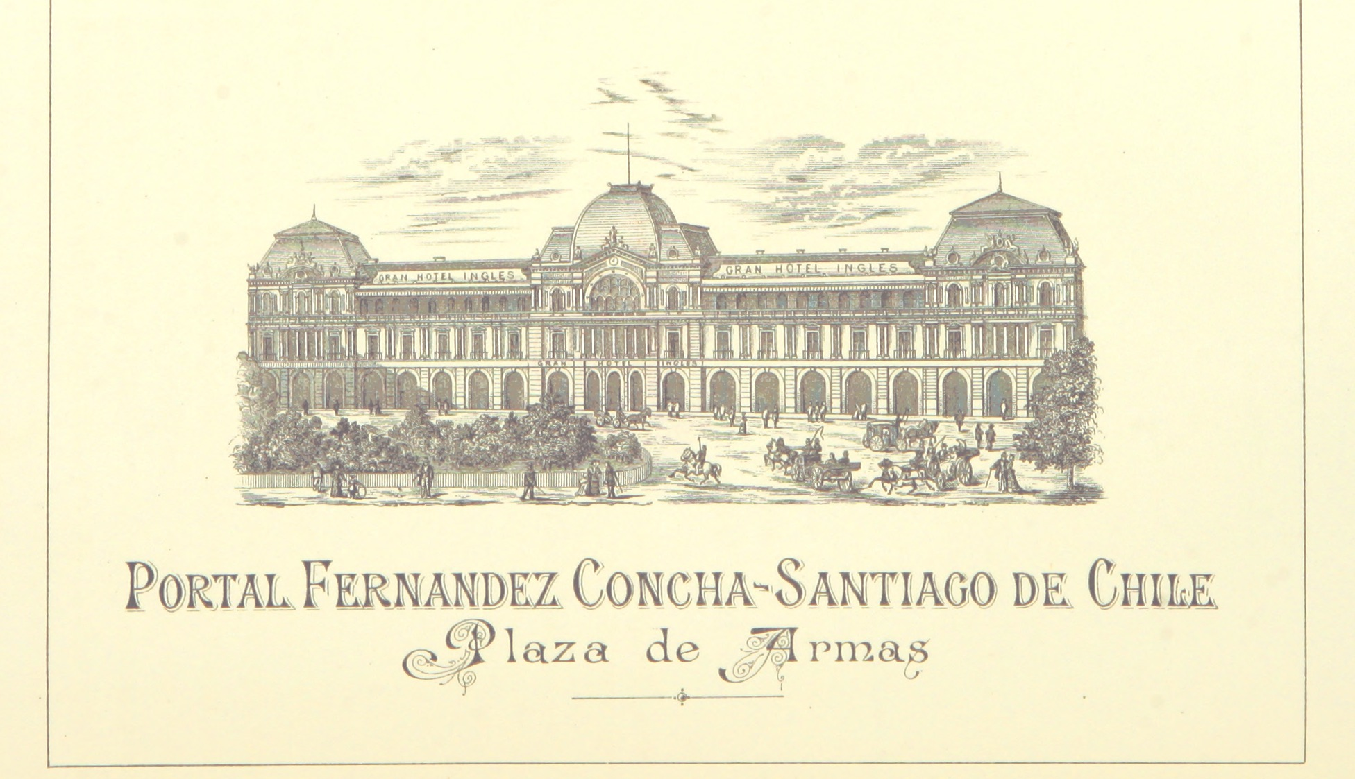 Image taken from page 334 of 'Krigen paa det stille Oceans Kyst ... Chile mod de forenede Magter Peru og Bolivia. En historisk Fremstilling, etc'